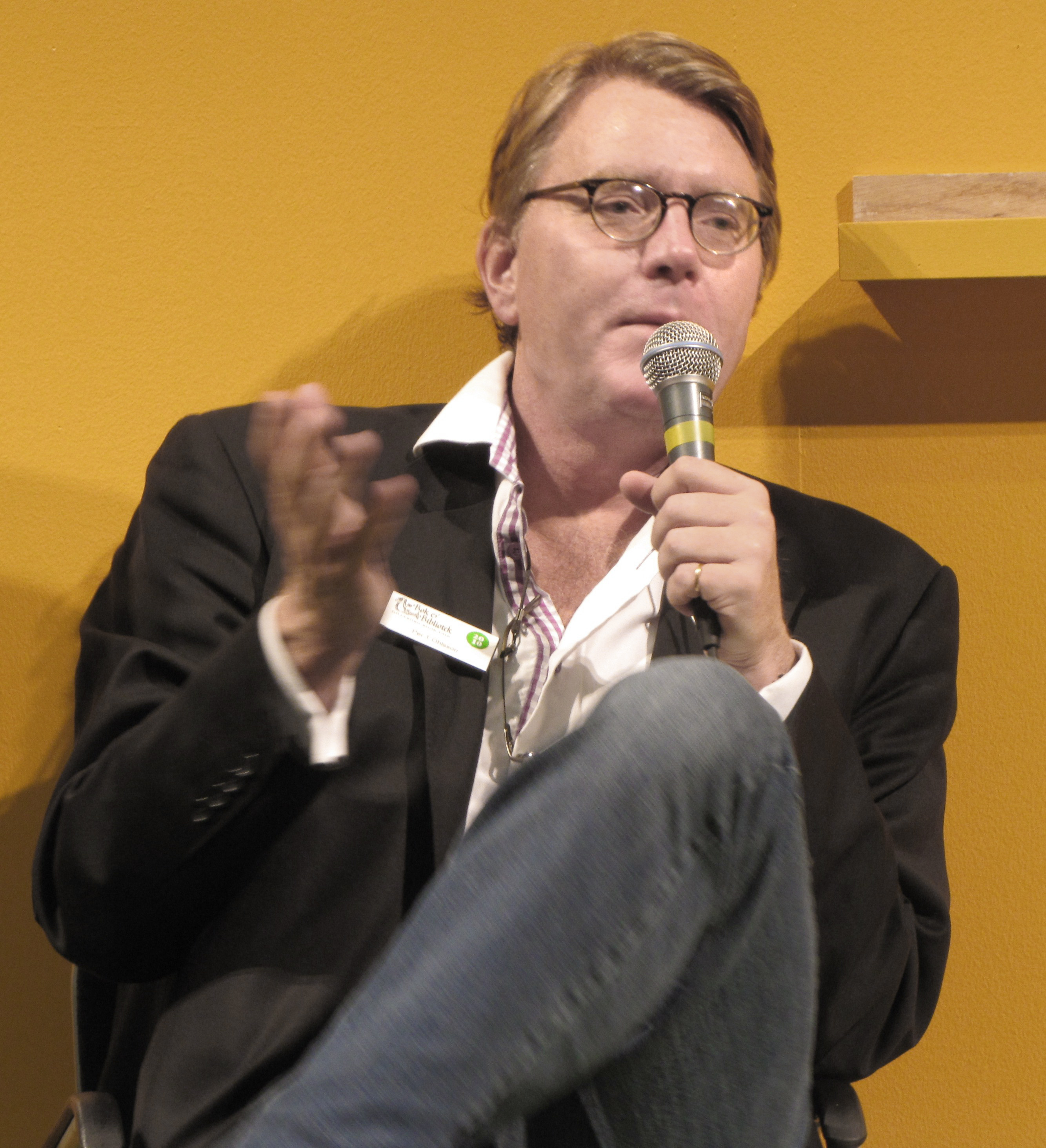 Per T Ohlsson berättar på Bokmässan 2010 om bokverket Sveriges statsministrar under 100 år till vilket han själv har bidragit med två delar.